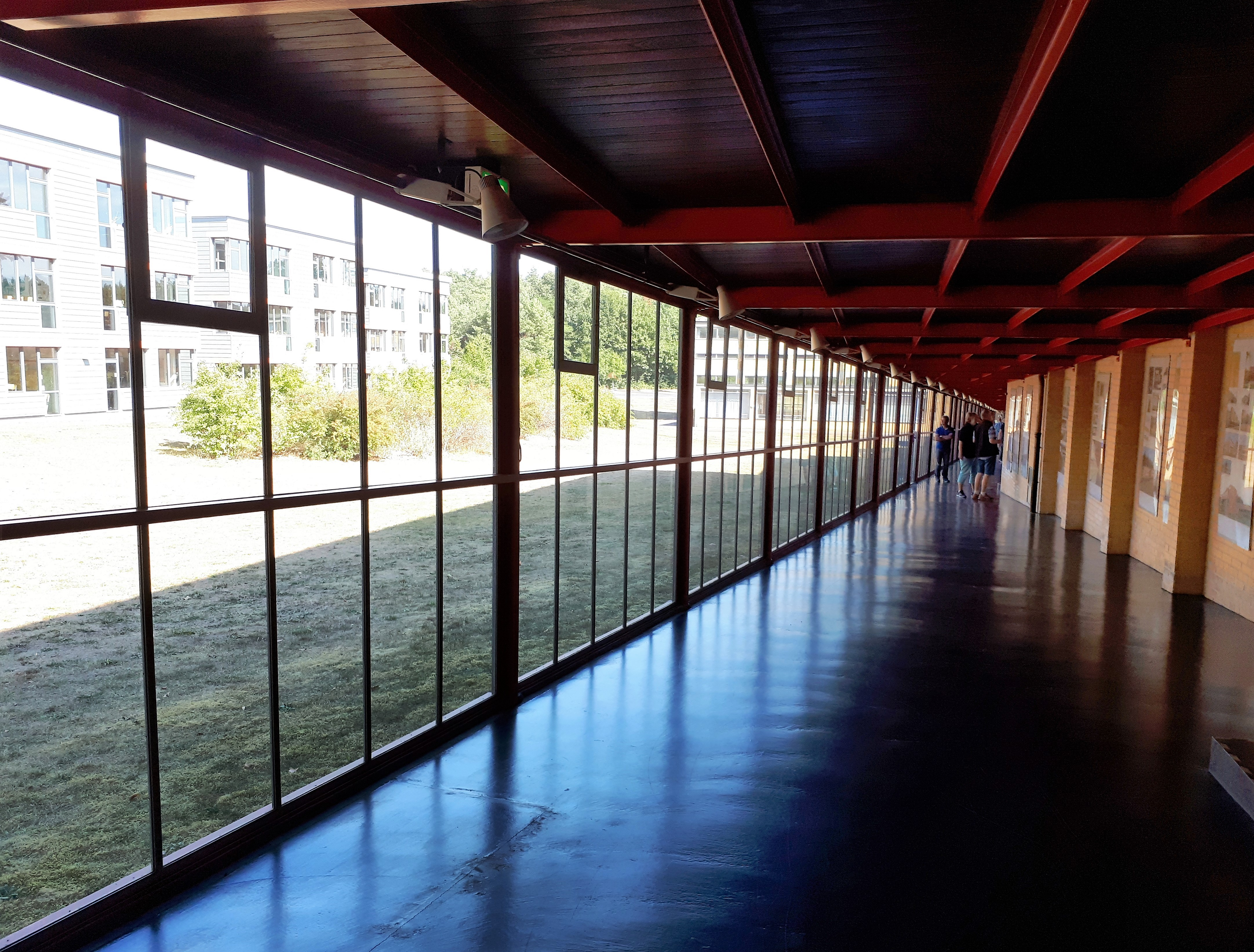 Bernau ADGB-Schule Glasgang